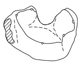 Left upper molar of Afriquiamus nessovi, modified after Sigogneau−Russell (1999).